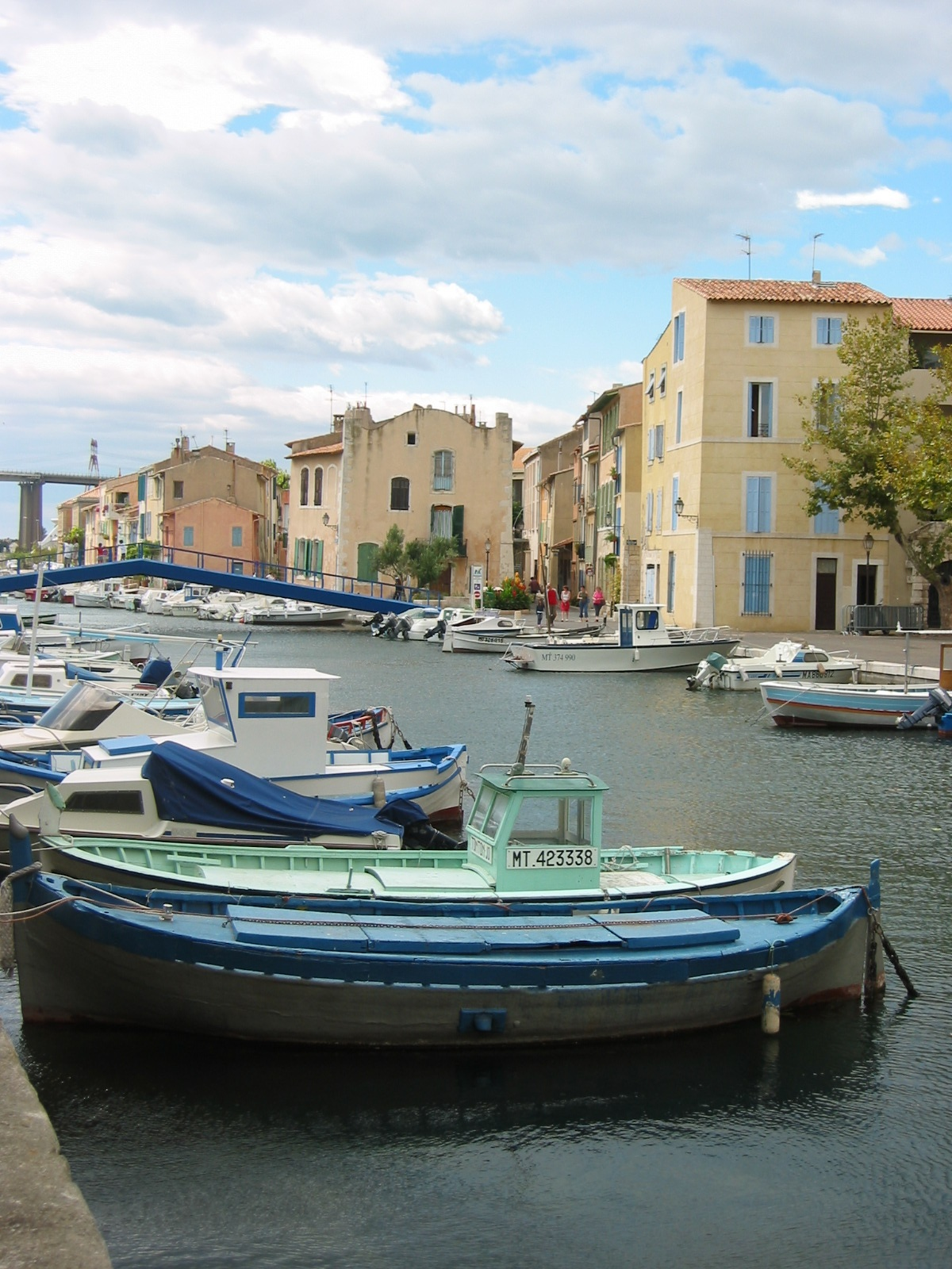 Martigues, Bouches-du-Rhône, France Quartier de l'île sur le canal, avec au milieu de la photo la maison "au chapeau de gendarme" Lieu célèbre de Martigues car c'est dans cete maison que fut tournée "La cuisine au Beurre" avec Bourvil et Fernandel